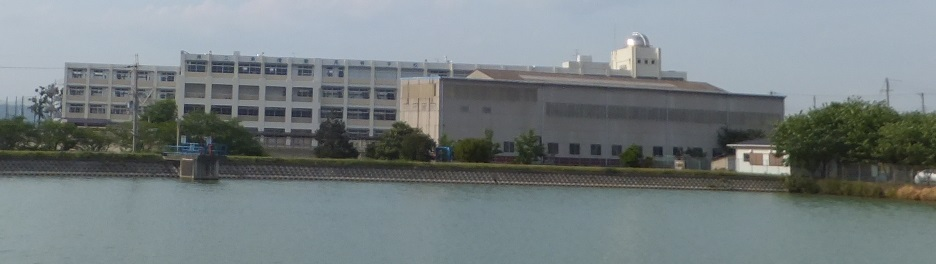 兵庫県立東播磨高等学校